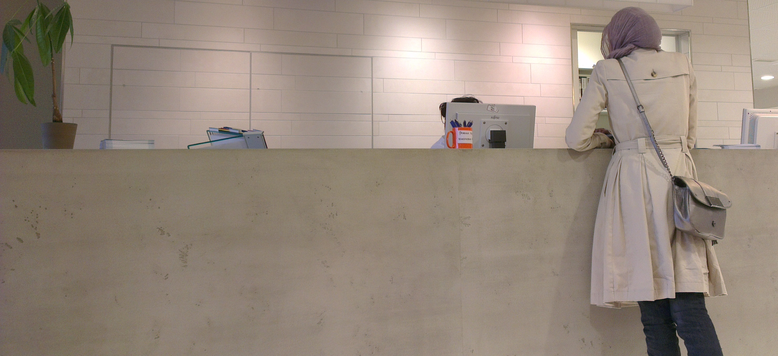 Een balie in een ziekenhuis in Velp.